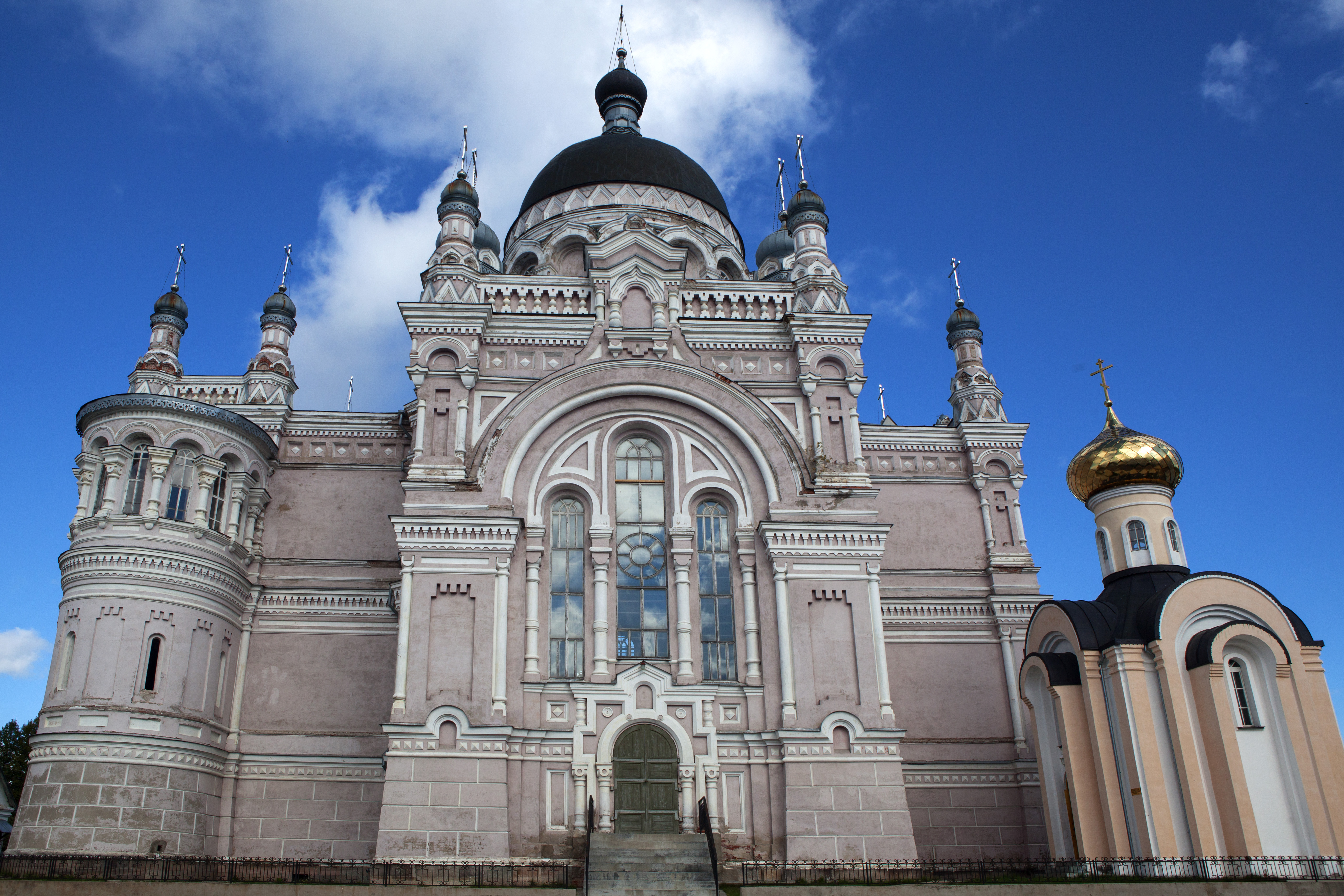 Казанский собор: Красный городок, Вышний Волочёк, Тверская область